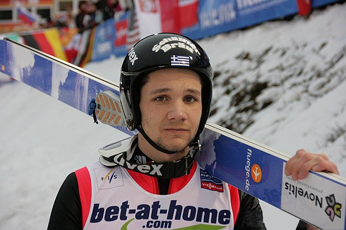 Nico Polichronidis podczas konkursu indywidualnego mężczyzn na skoczni normalnej w ramach Mistrzostw Świata 2013.